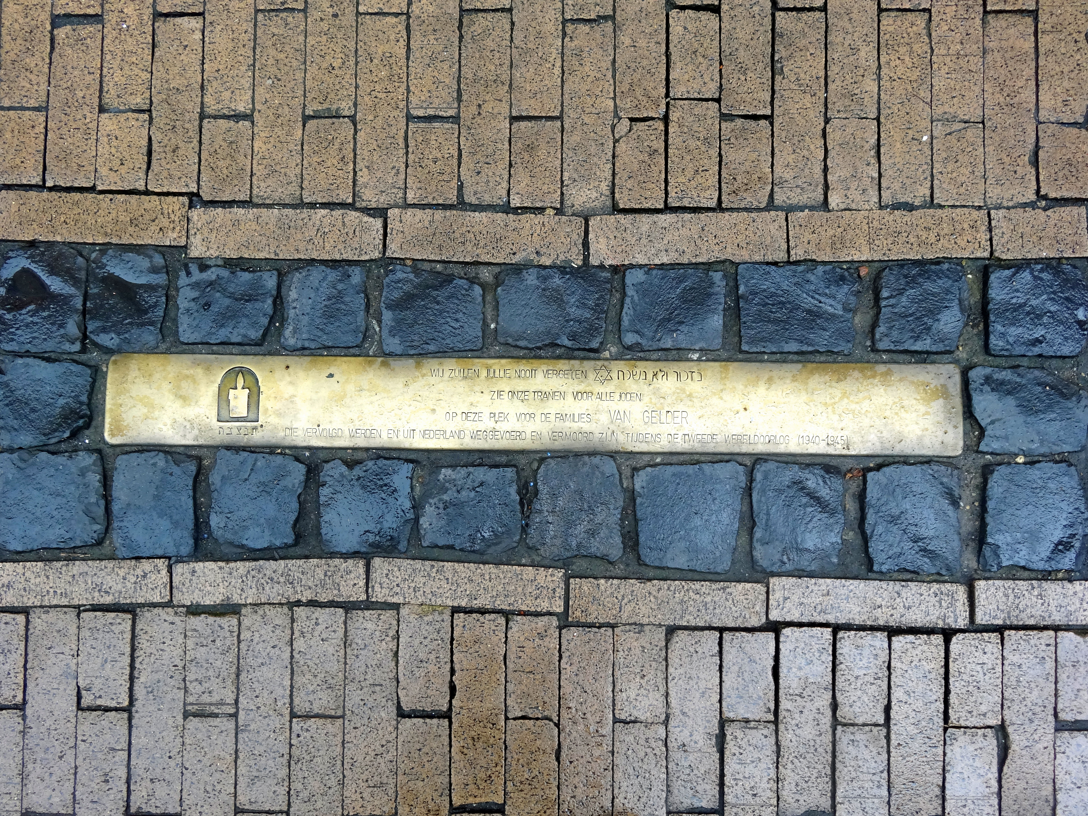 Stolperdrempel, Folkingestraat 34: "Wij zullen jullie nooit vergeten - zie onze tranen voor alle Joden - op deze plek voor de families Van Gelder - die vervolgd werden en uit Nederland weggevoerd en vermoord zijn tijdens de Tweede Wereldoorlog (1940-1945)